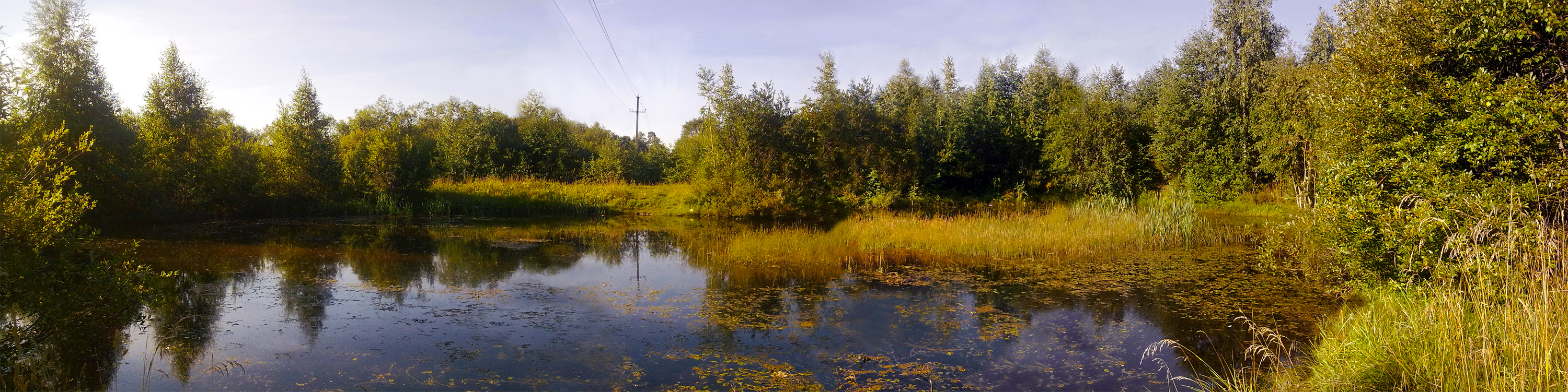 Панорама пруда (на территории садоводства "Пламя")в посёлке Новый Учхоз.